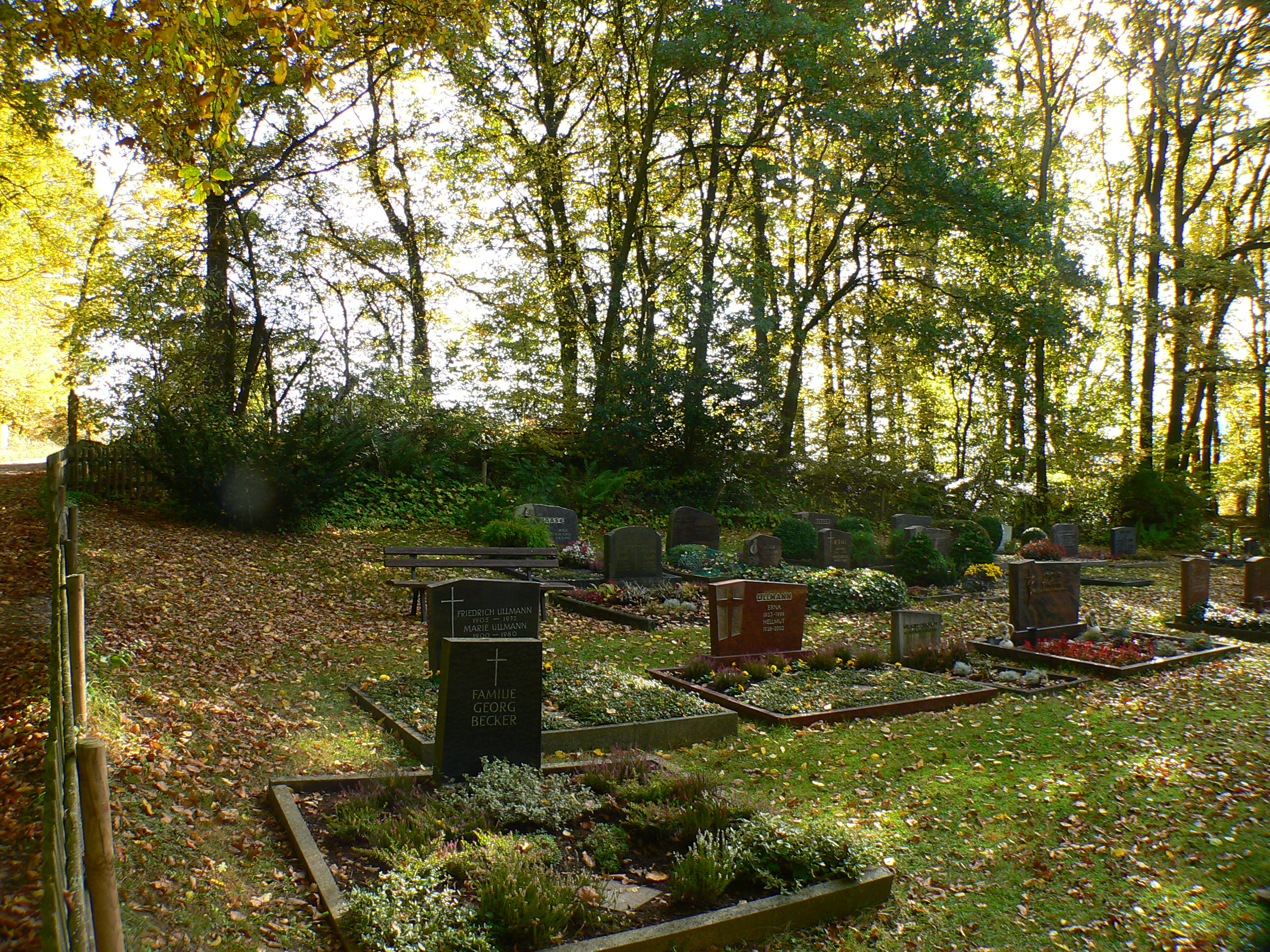 Burgstall in Fuldatal-Knickhagen (Wall und Graben) im Landkreis Kassel, Hessen, Deutschland